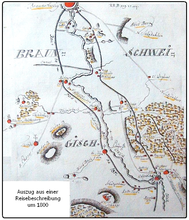 Skizze einer Karten zwischen Braunschweig und Wolfenbüttel